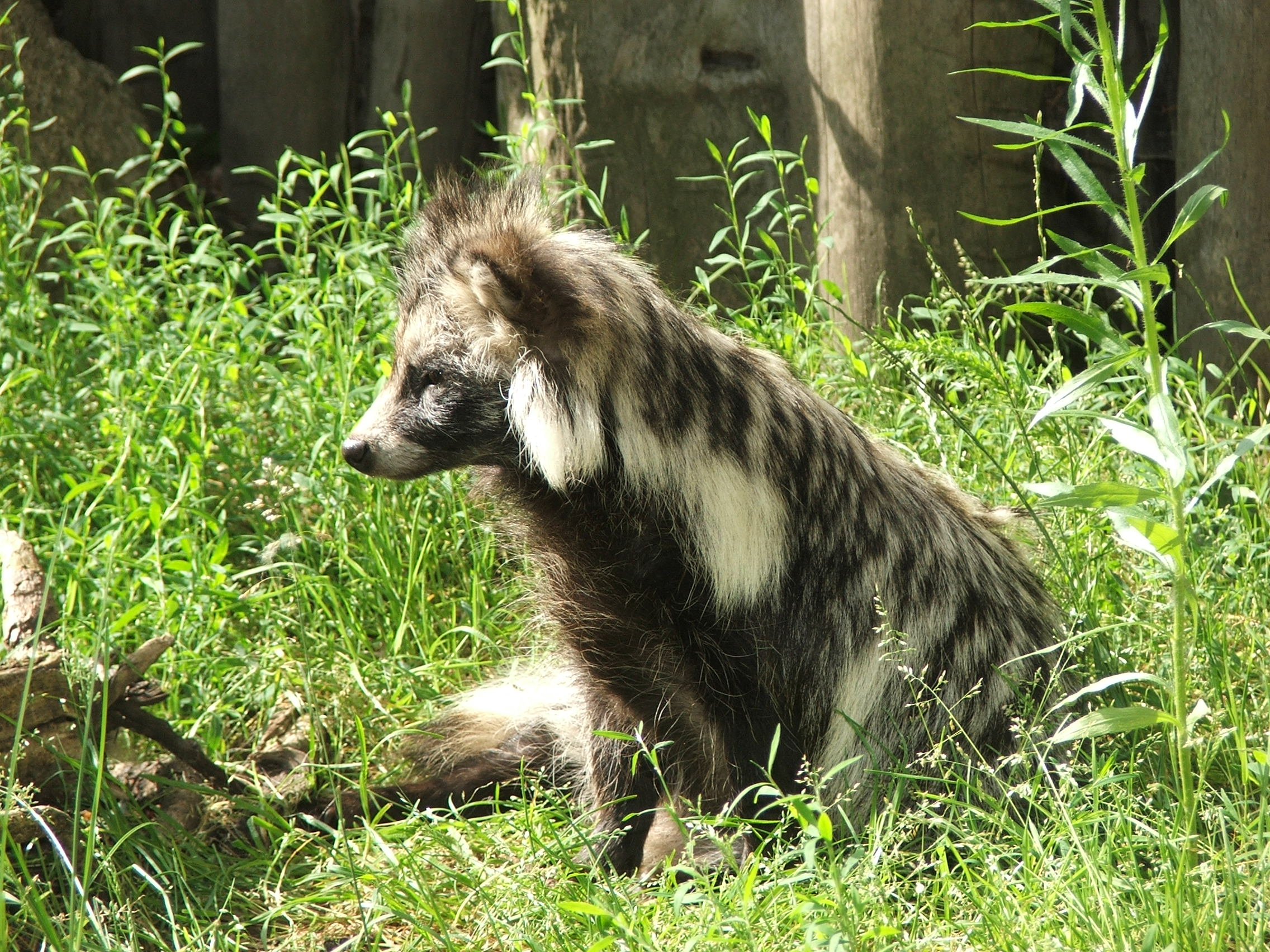 Nyctereutes procyonoides (ZOO in Ueckermünde)